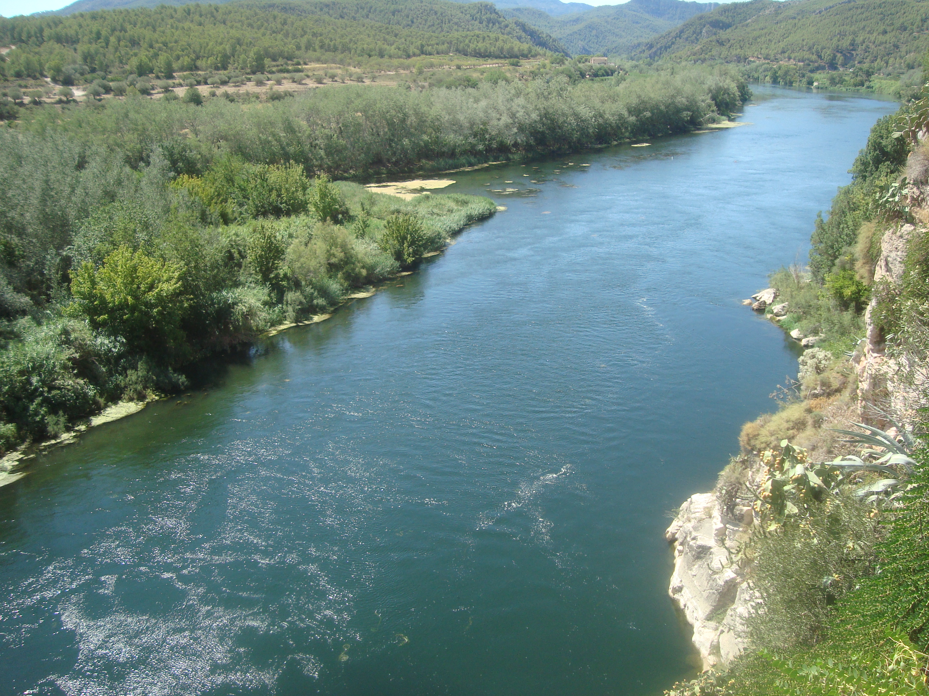 El río Ebro a su paso por Miravet (Ribera d'Ebre, provincia de Tarragona, Cataluña).